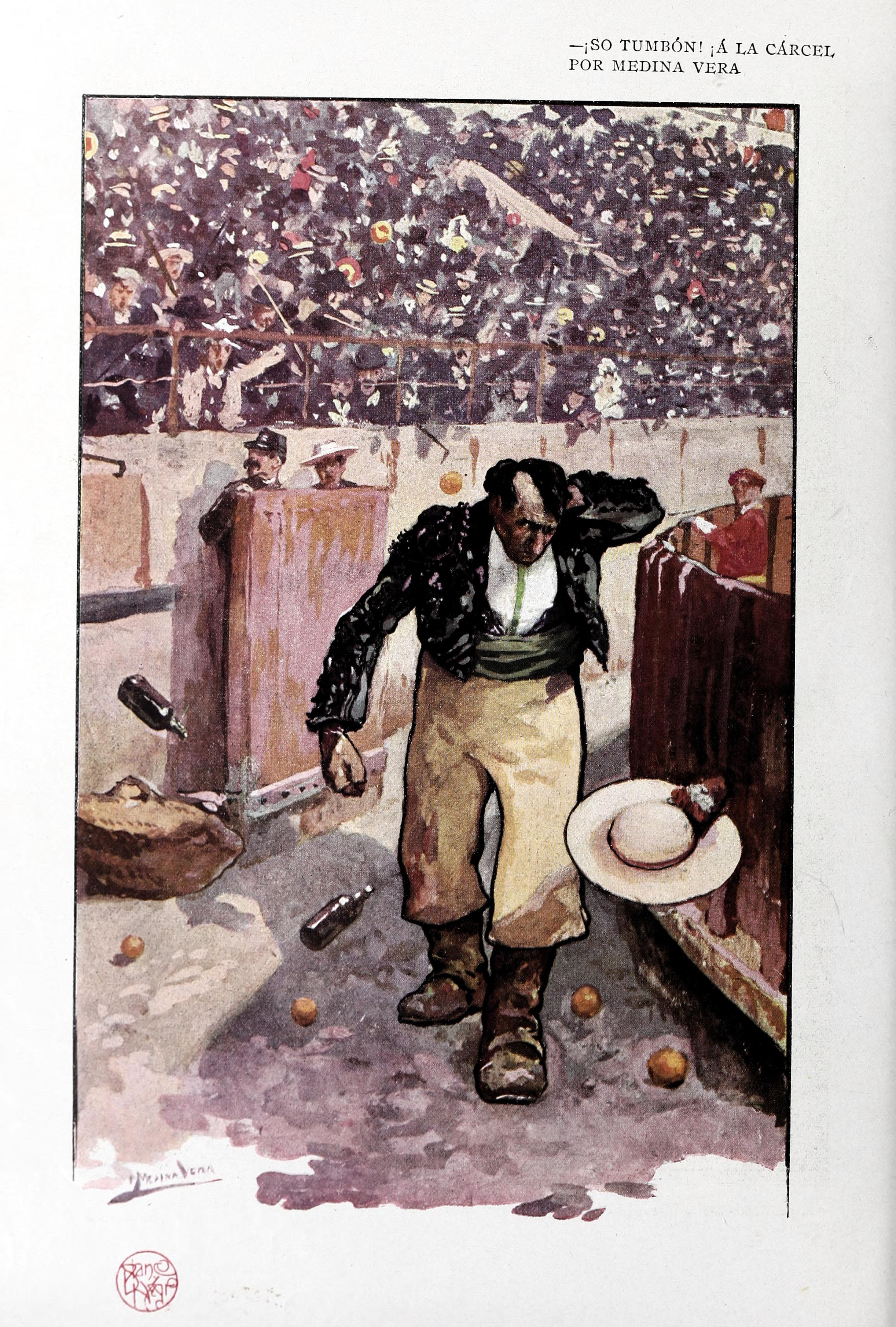 ¡So tumbón! ¡A la cárcel!.